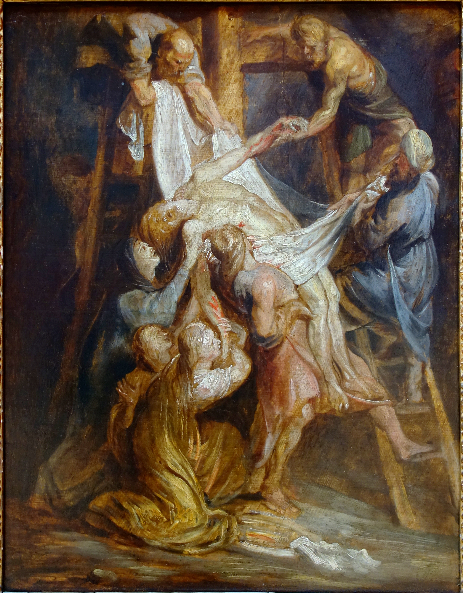 esquisse